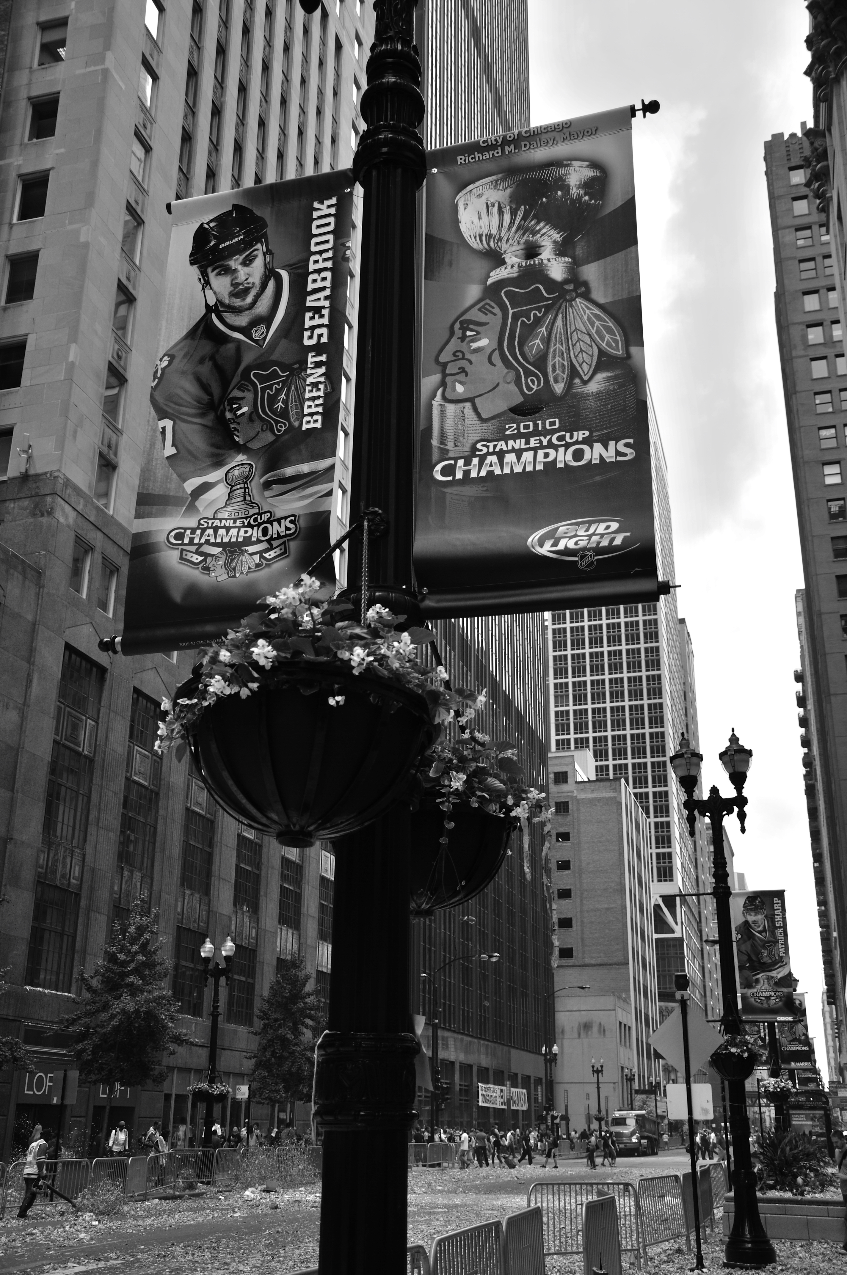 Seabrook Banner